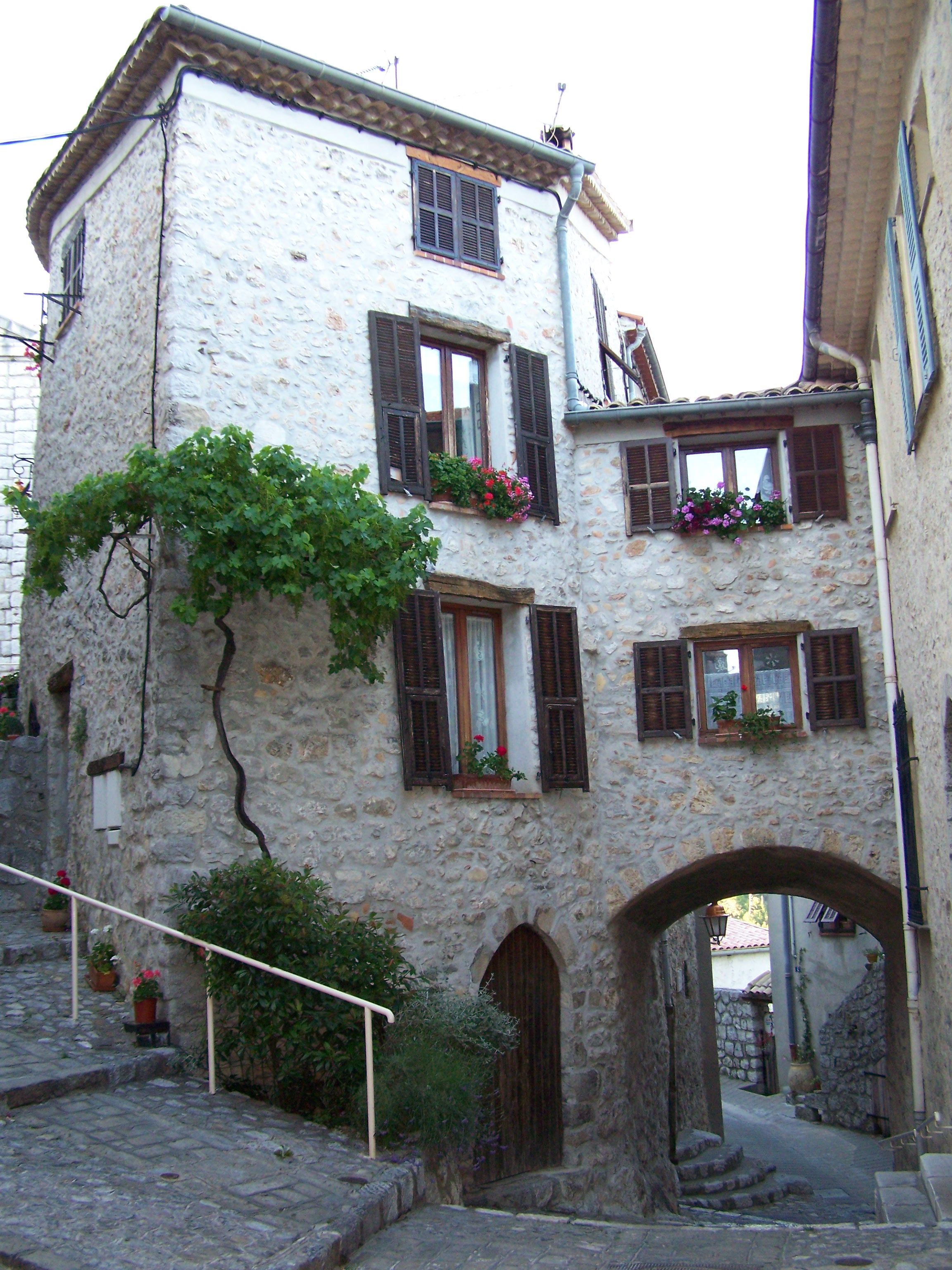 Maison ancienne (Propriétaire Mr et Mme GIRAUD Patrick) (Alpes-Maritimes, France)